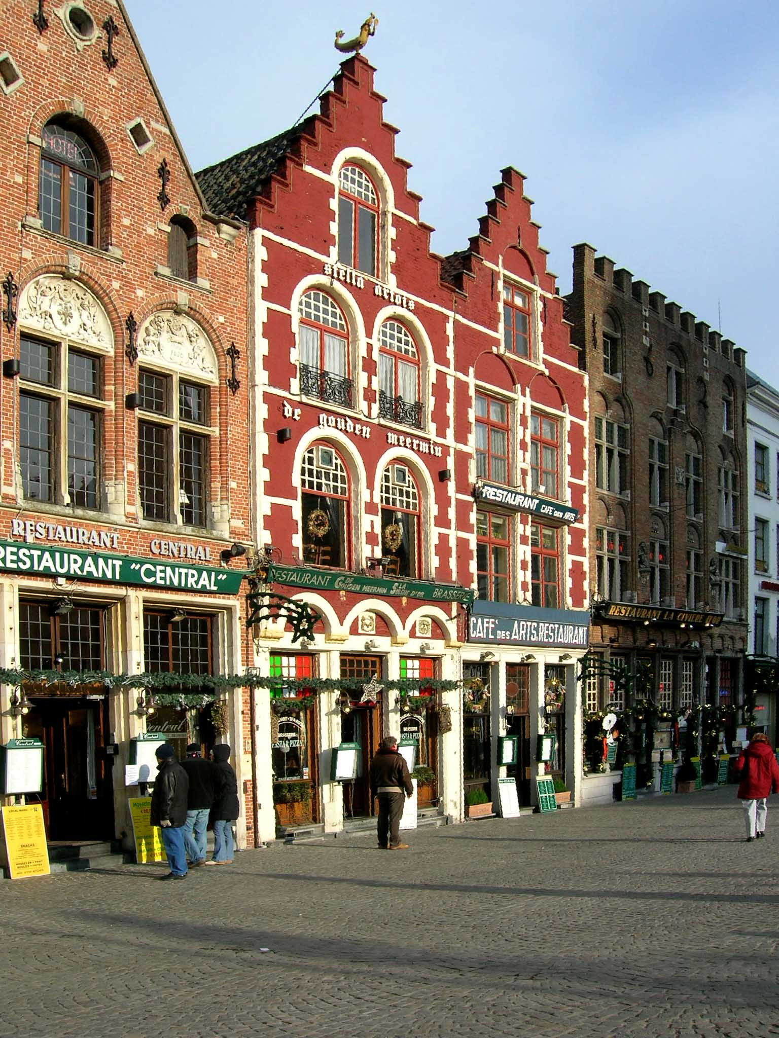 Maartplaz mat sengen Restauranten Source: Eege Foto vum Ernmuhl Lizenz